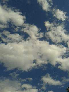 cielo nublado